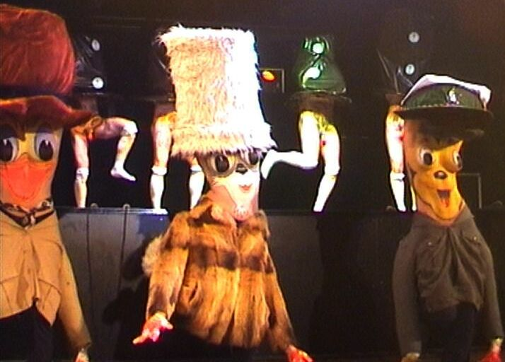 TV-Fasching, 4.2.2000: Der legendäre "Hütchentanz" (Frauen vorn) mit der Medi-Einlage (Männer hinten). own photograph --Uwe Gille 20:26, 24 January 2006 (UTC)